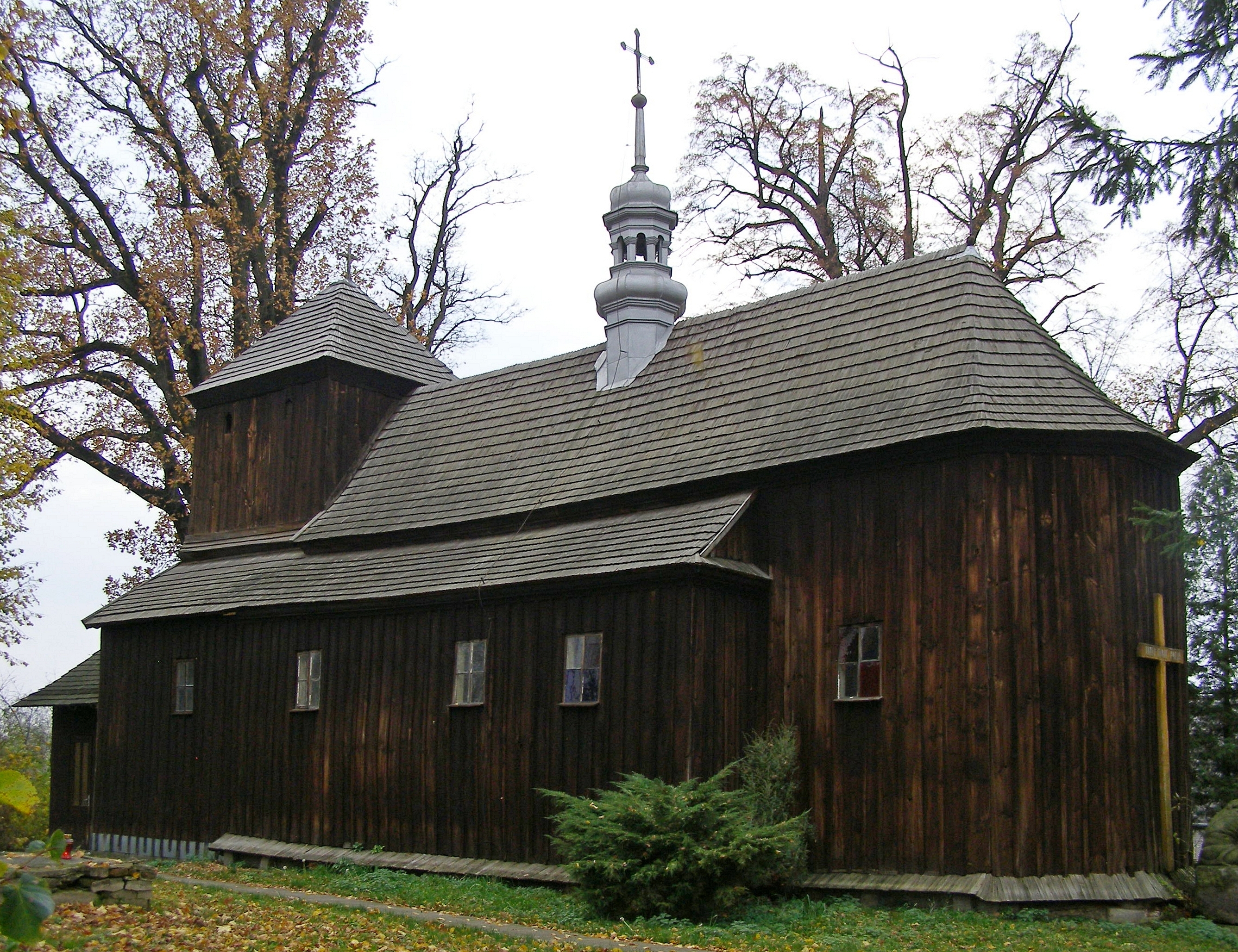 wieś Krzeczowice